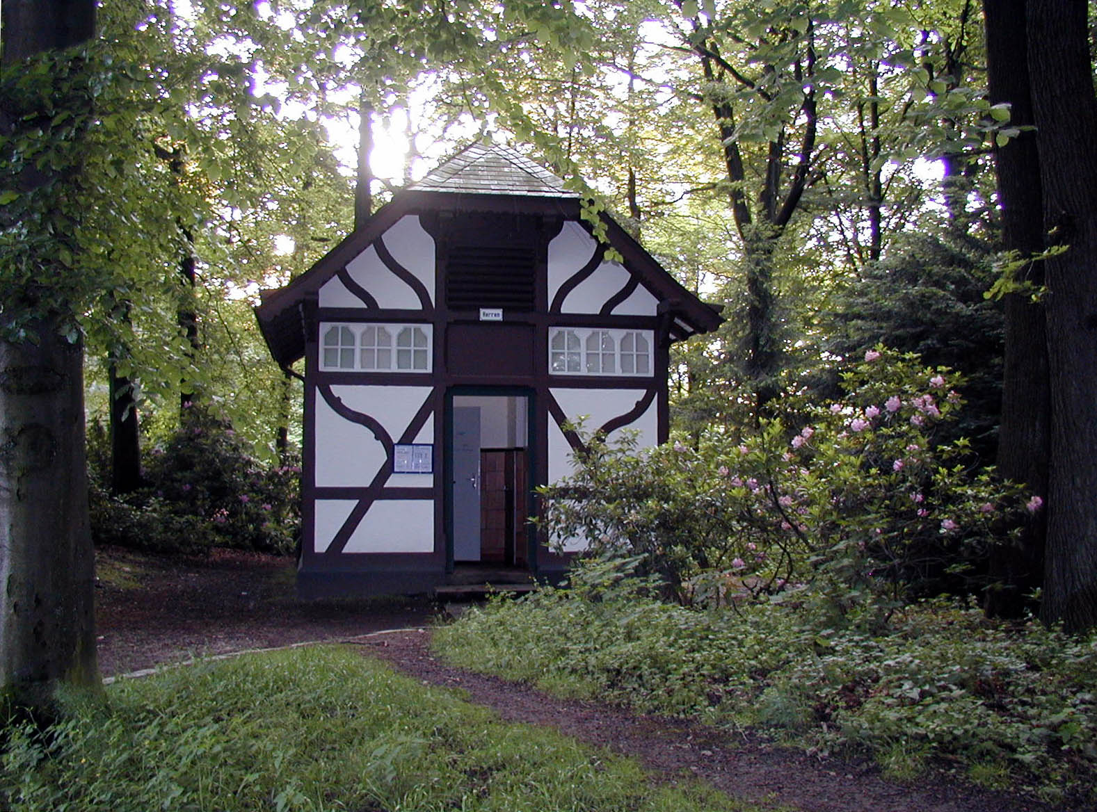 Das Toilettenhäuschen an der Eisenlohrstarße in Wuppertal-Barmen am Toelleturm